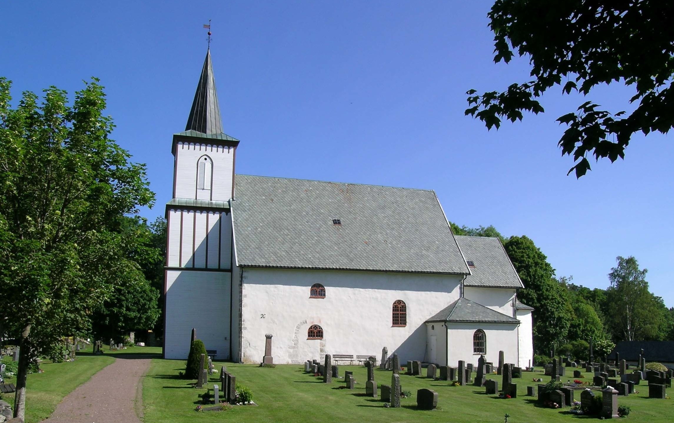 Tanum kirke, Larvik, Norway